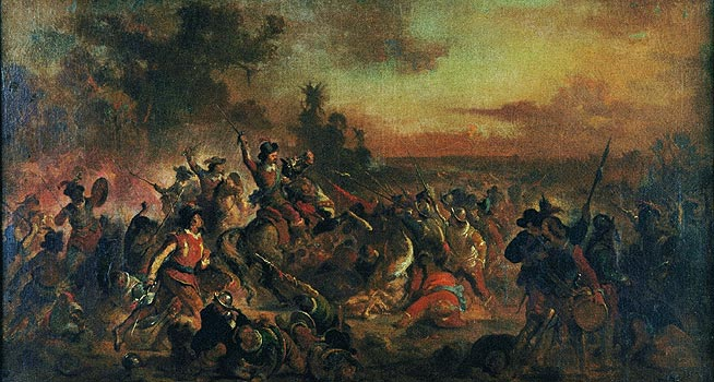 ESTUDO PARA BATALHA DOS GUARARAPES, Óleo sobre tela - 54 x 100 cm